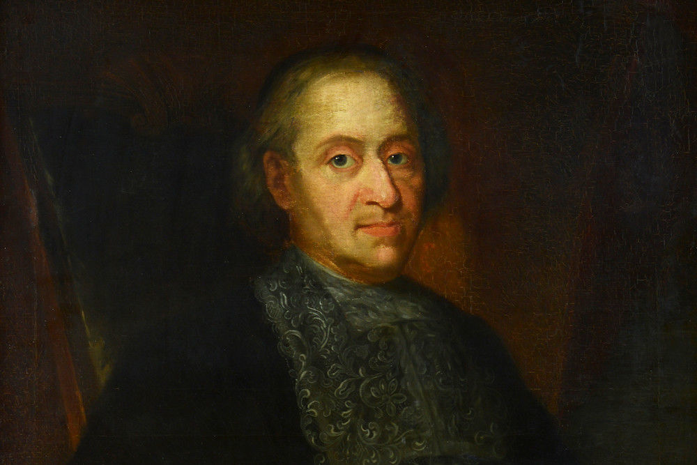 Depicted person: Veit Ludwig von Seckendorff (Kopie des Originals im Schloss Meuselwitz bei Altenburg; Reproduktion: Markus Scholz)